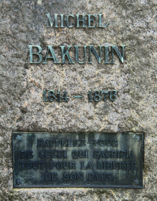 Bakunin Grave Bremgartenfriedhof Bern